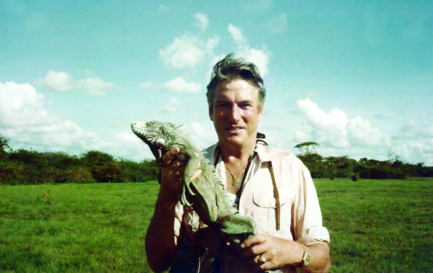 El científico venezolano Pedro Trebbau a finales de la década de 1970.